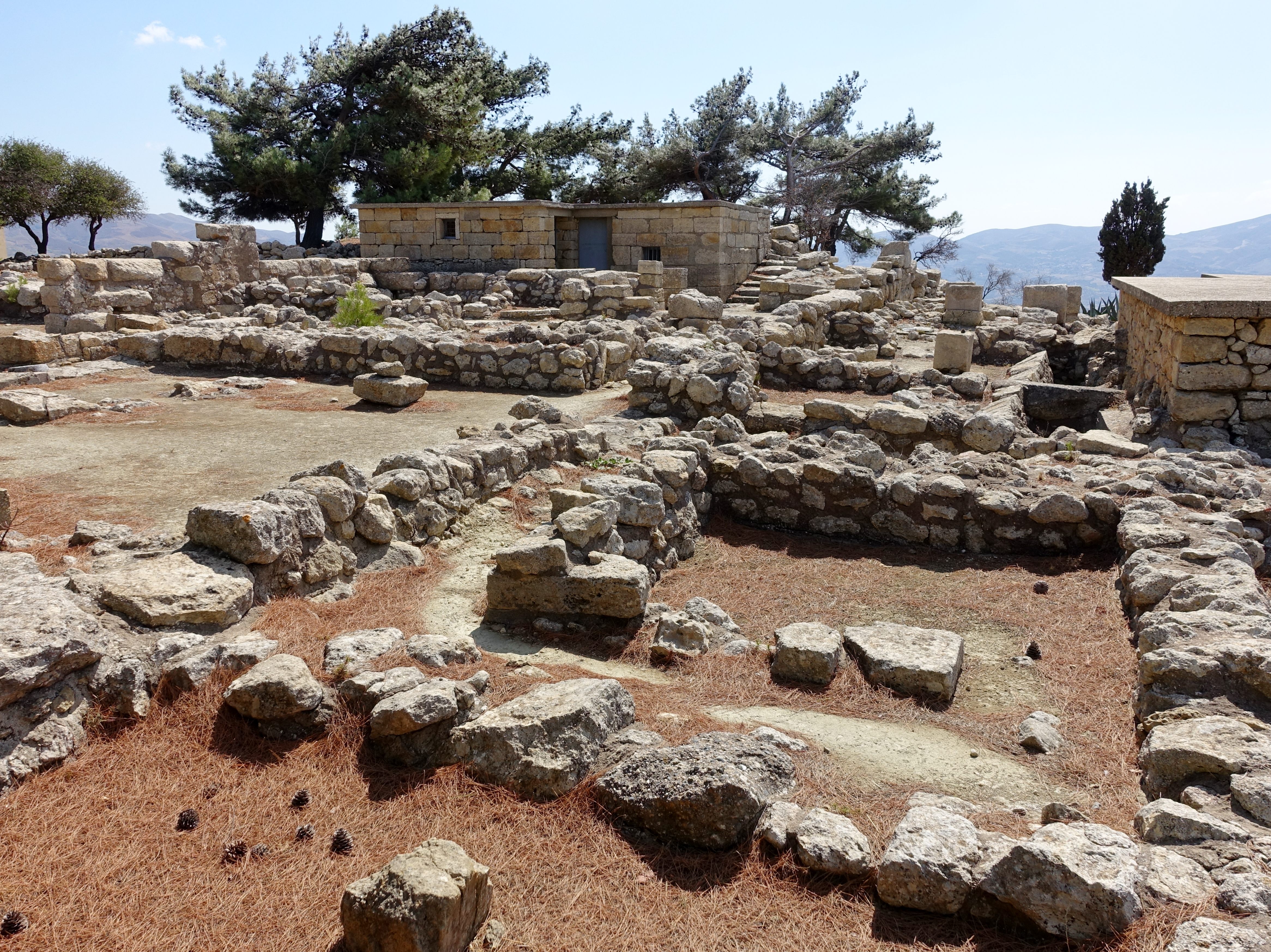 Ausgrabungsstätte der „Villa“ von Vathypetro (Βαθύπετρο), Gemeinde Archanes-Asterousia, Kreta, Griechenland